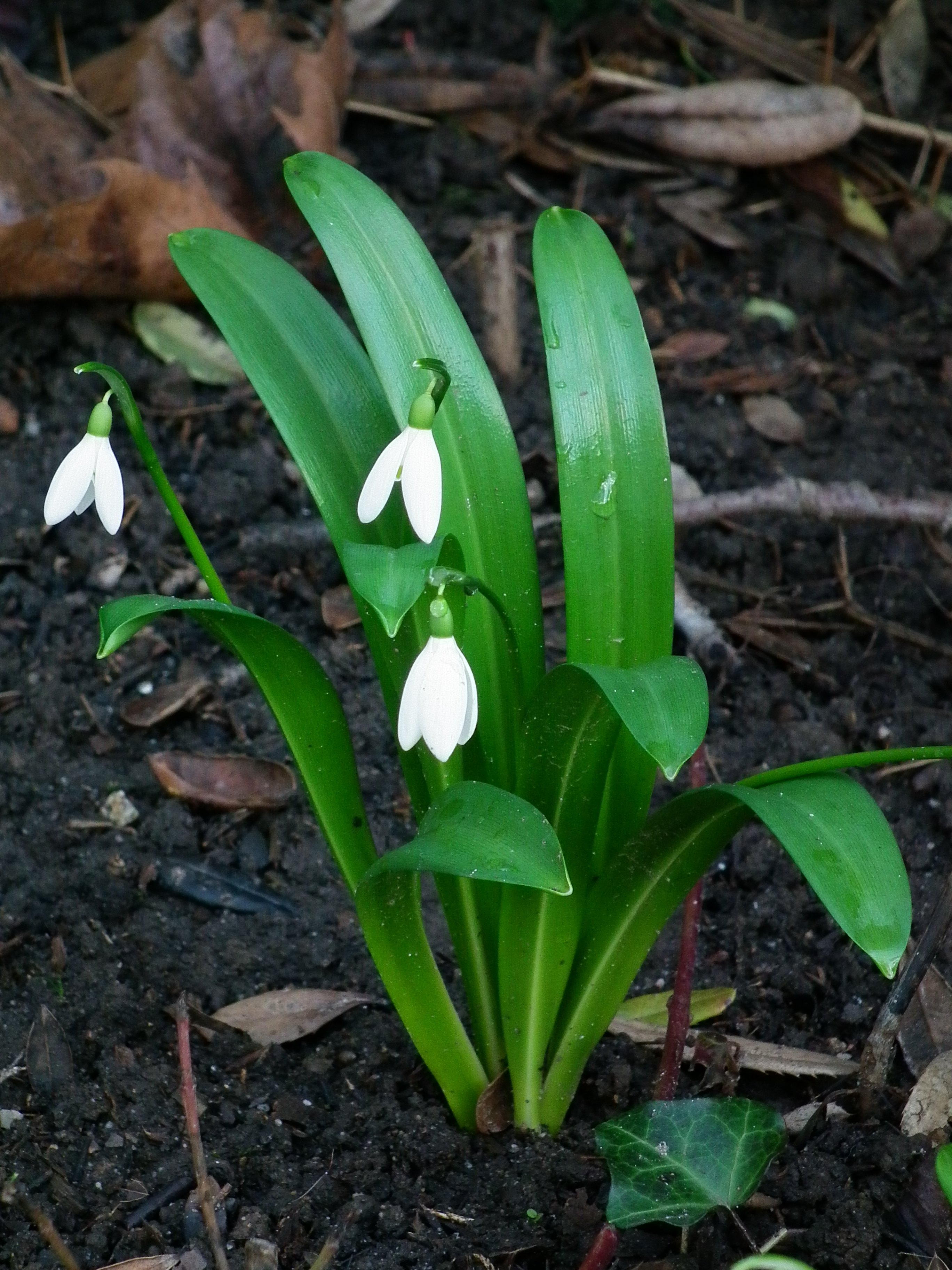 Schneeglöckchen (Galanthus), fotografiert in Heidelberg (Baden-Württemberg, Deutschland)